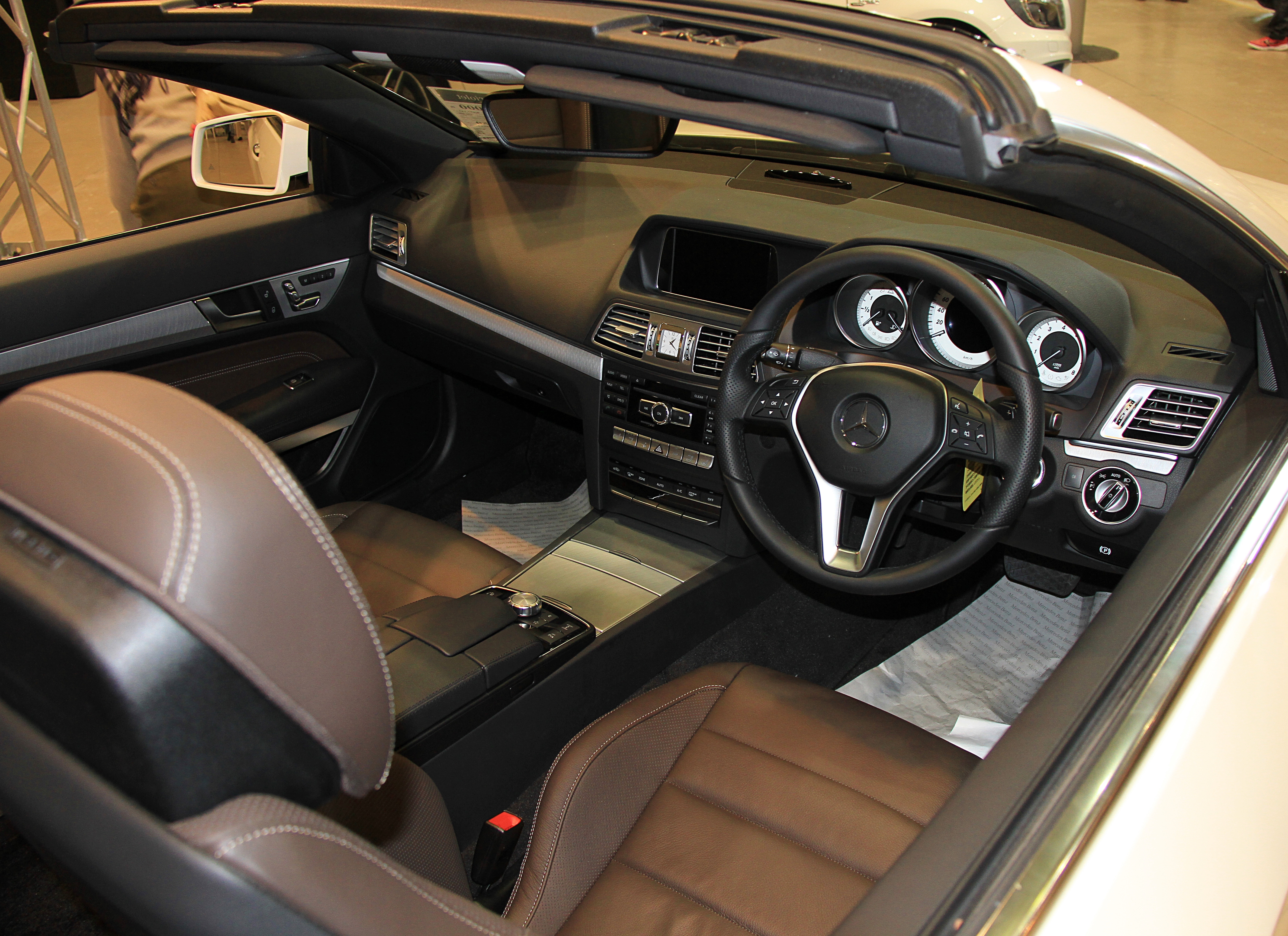 Mercedes-Benz A207